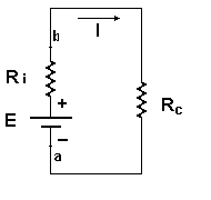 Circuito con generador real. Este diagrama ha sido creado por PACO 19:16 7 oct, 2004 (CEST).